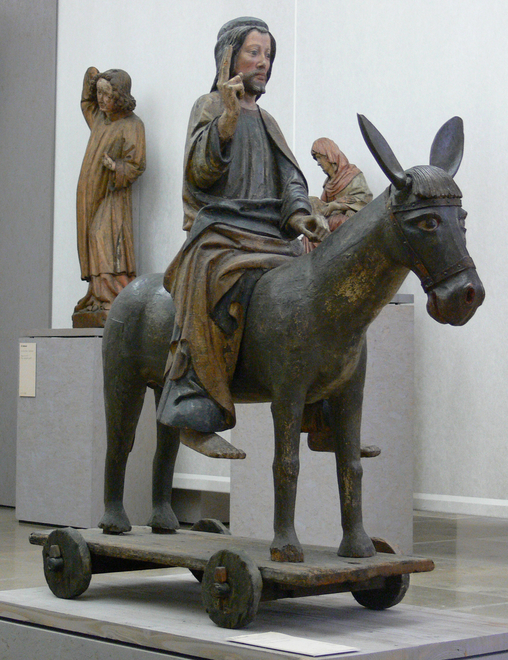 Palmesel, Schwaben, Ende 14. Jahrhundert; Lindenholz mit späteren Fassungen aus Veringendorf (heute zu Veringenstadt, Kreis Sigmaringen) Württembergisches Landesmuseum Stuttgart